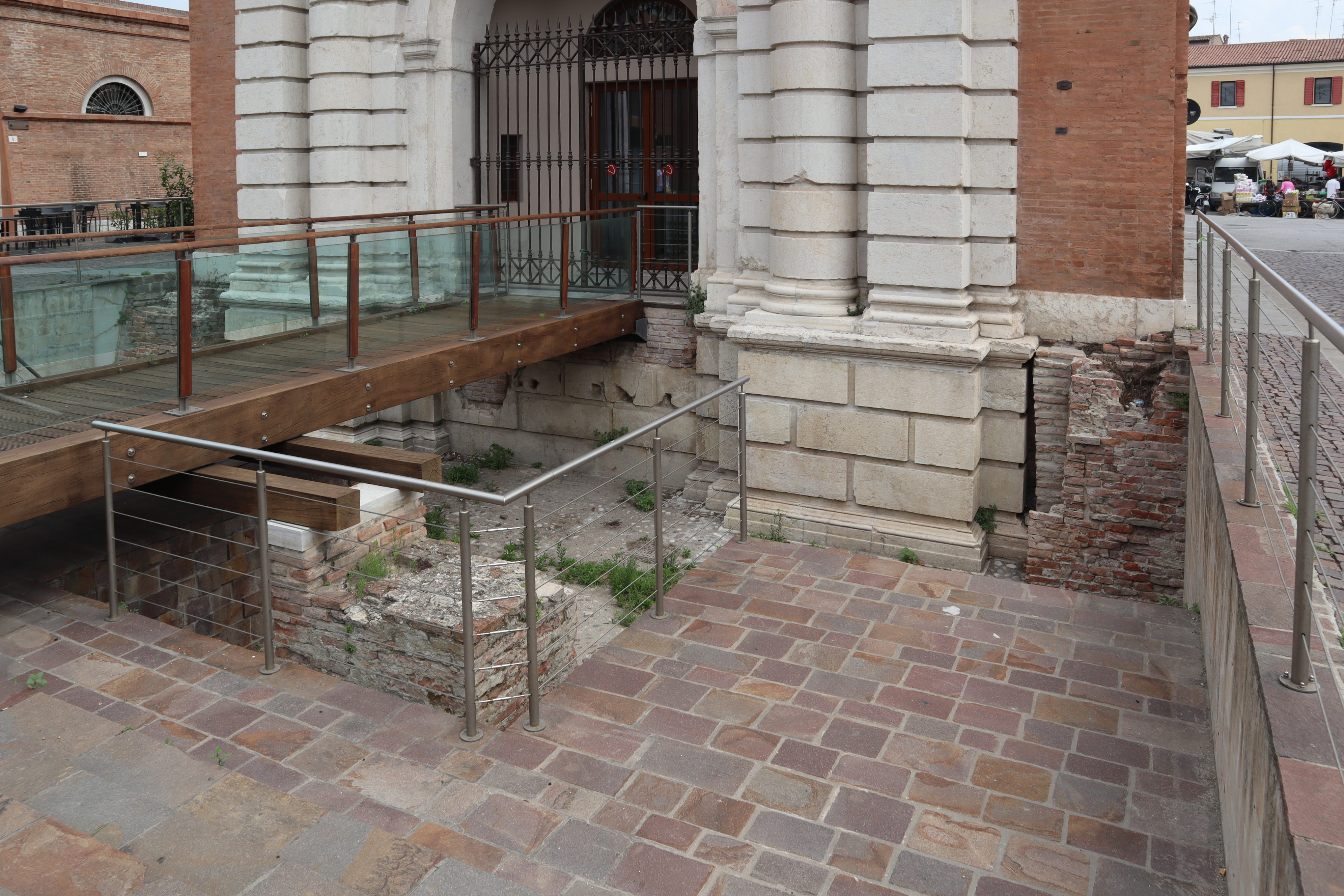 Porta Paola a Ferrara. Prospetto verso via Bologna. Scavi.